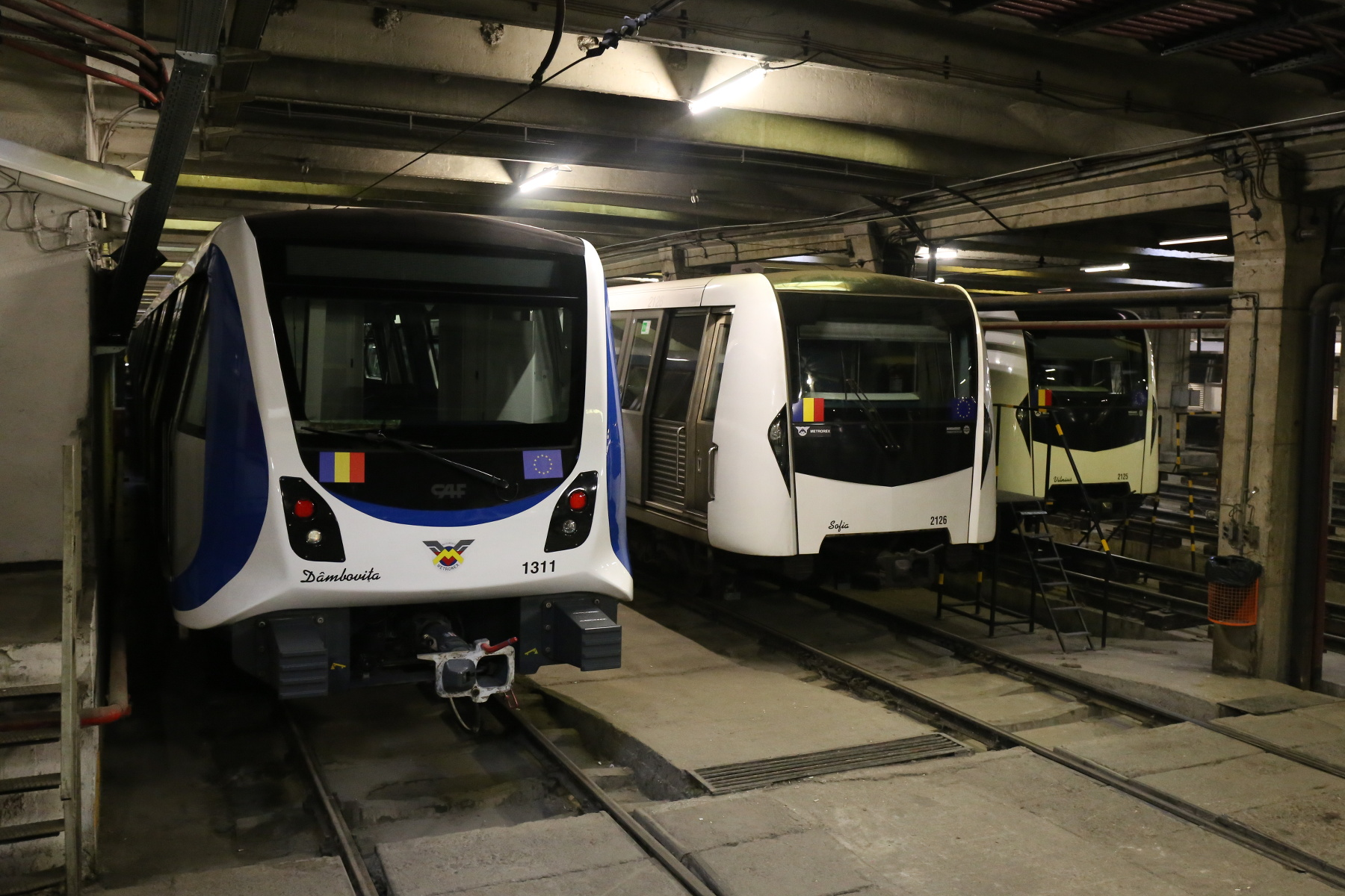 Rame CAF și Bombardier din dotarea metroului București in depoul Berceni